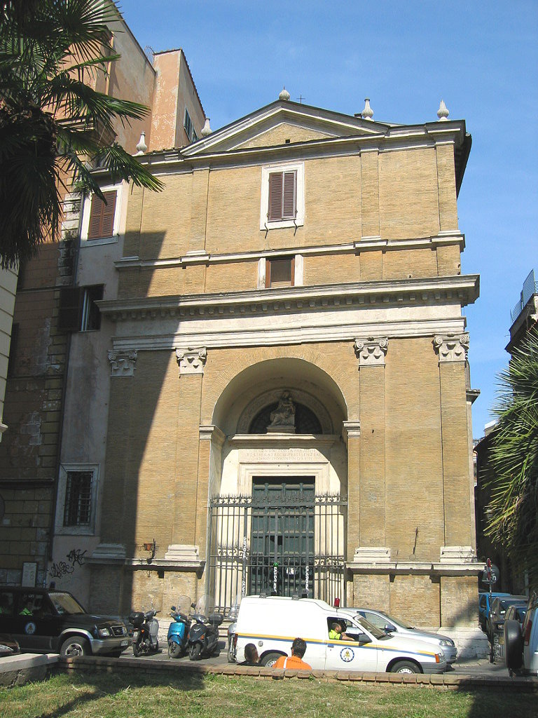 Chiesa di Santa Maria in Porta Paradisi, Roma.